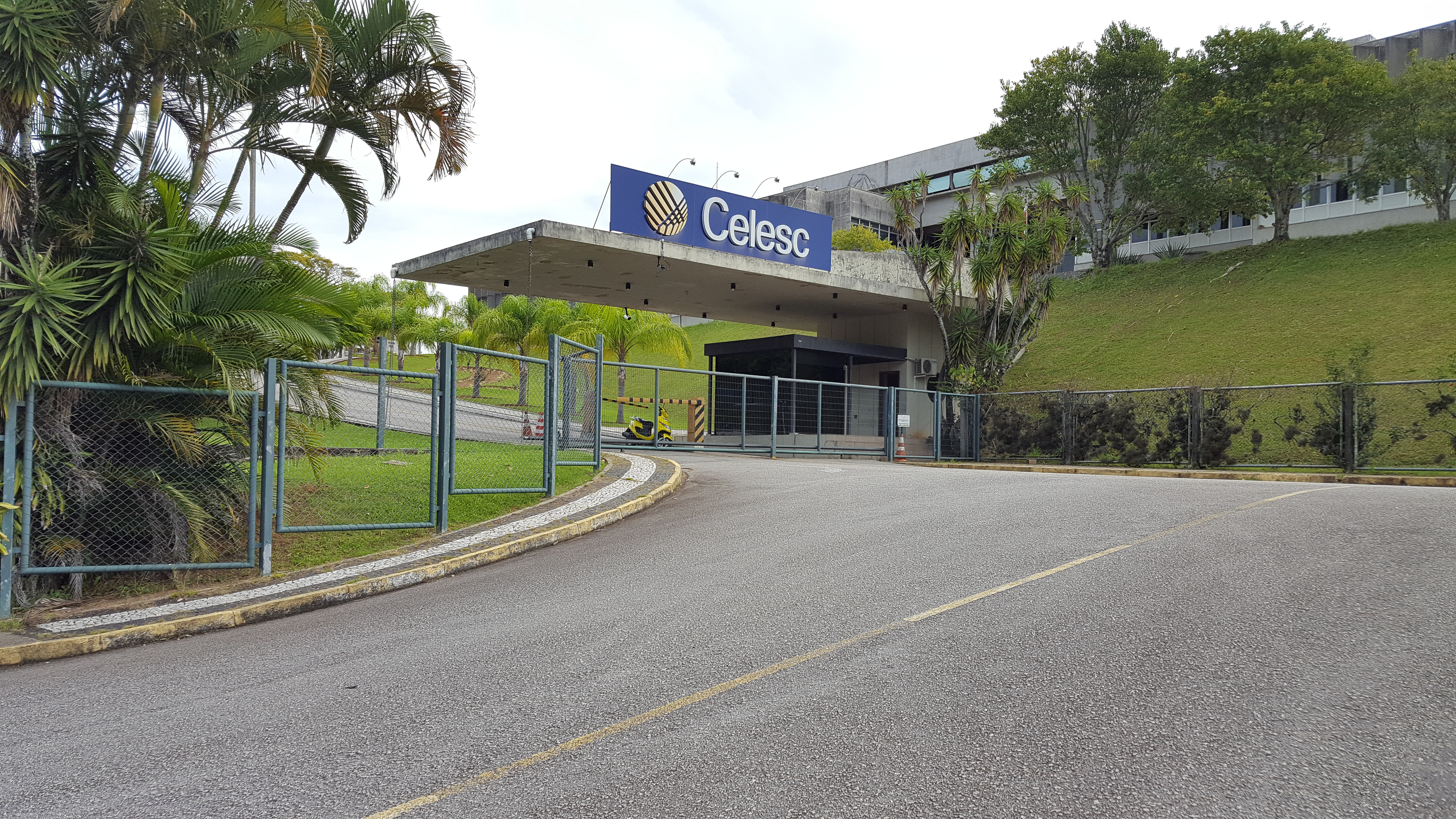 Entrada da Celesc em abril de 2017.